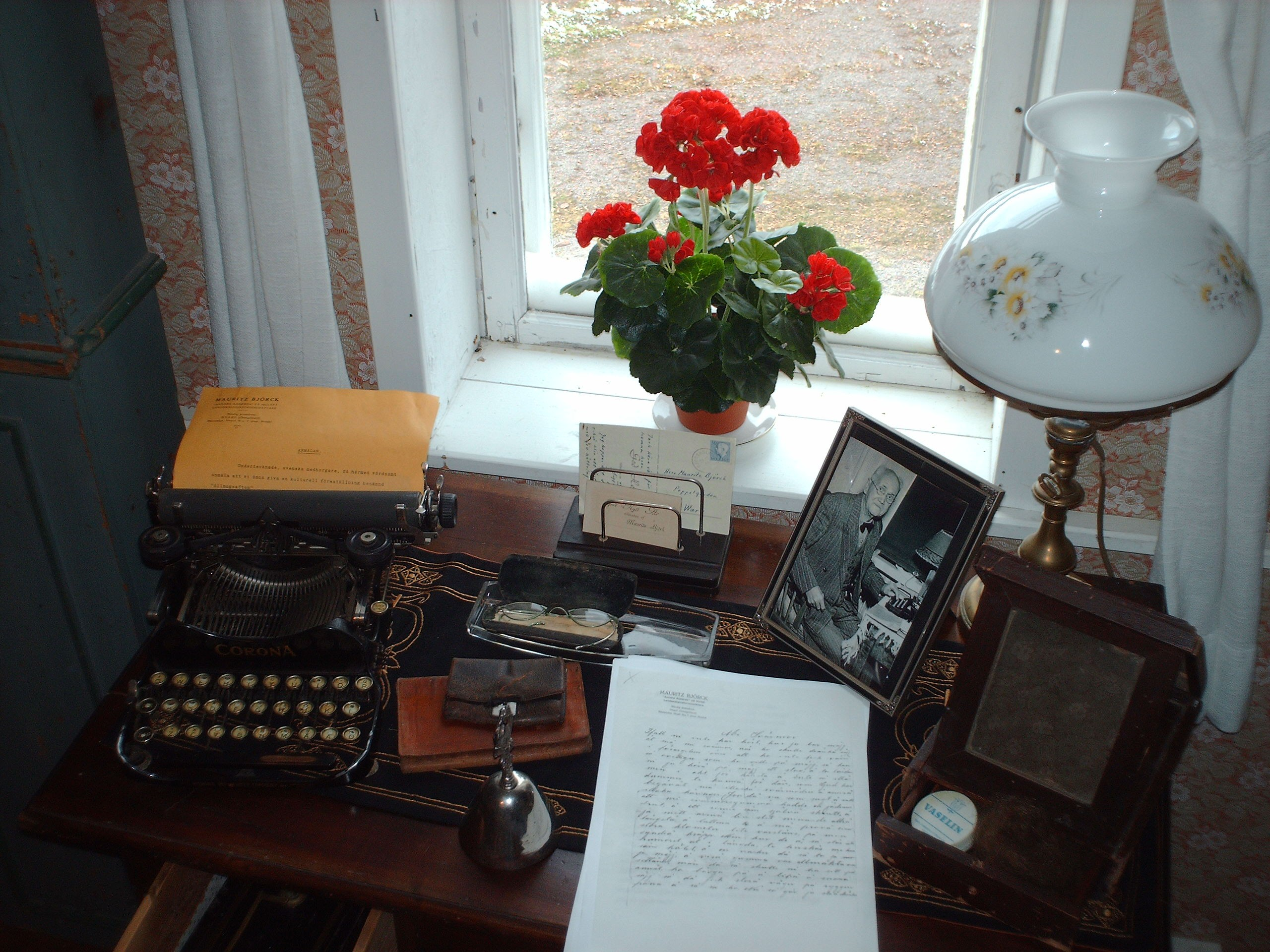 Anners Annersa museum